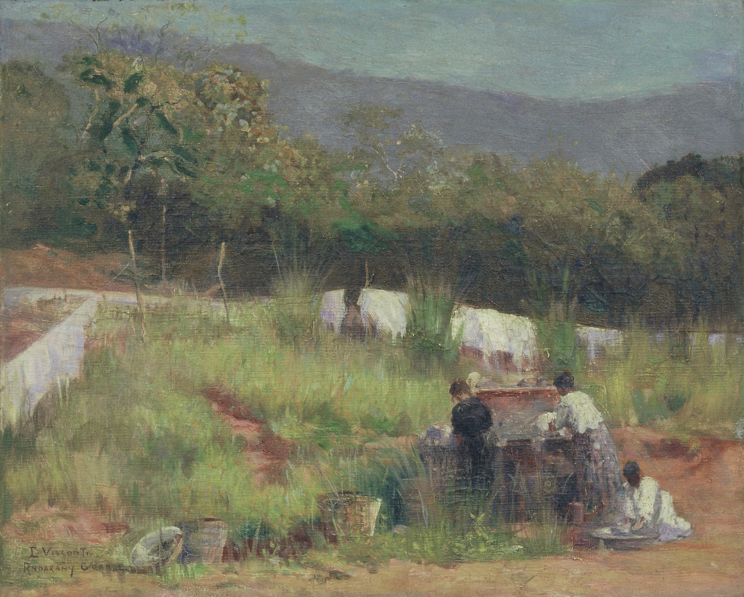 Obra do Projeto Eliseu Visconti